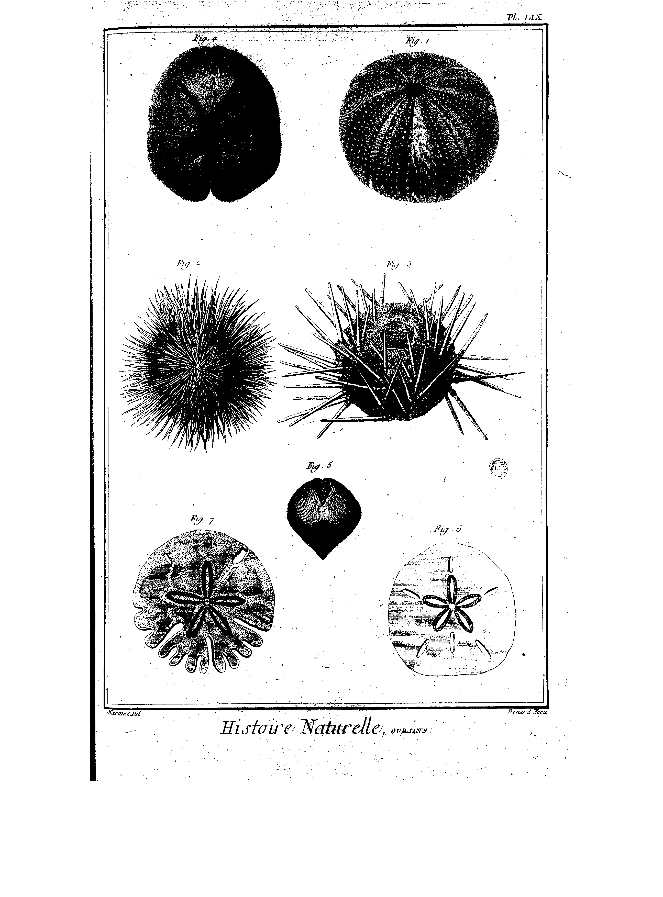 Planches de l'Encyclopédie de Diderot et d'Alembert, volume 5